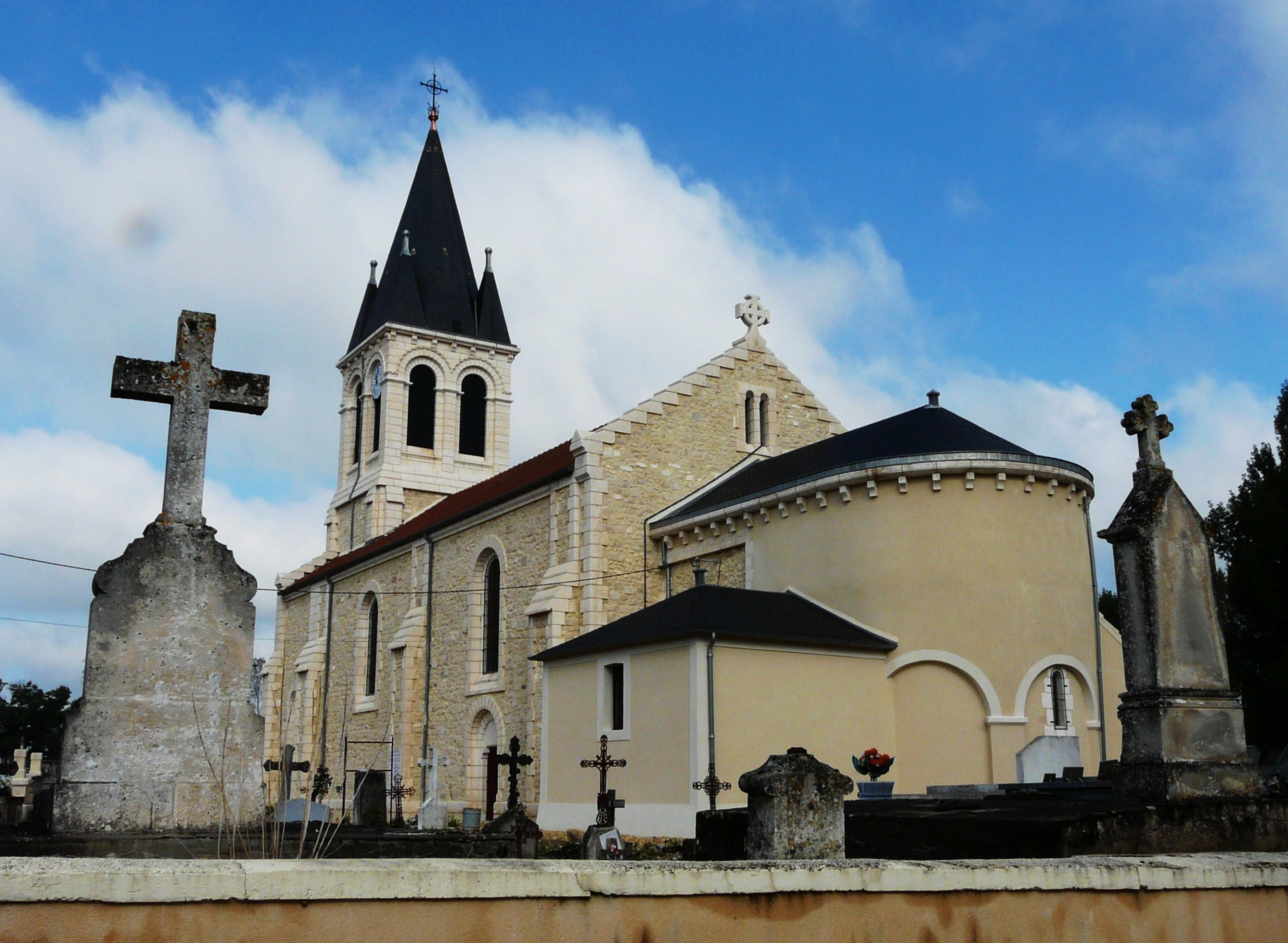 Église Saint-Jean-Baptiste de Ménesplet